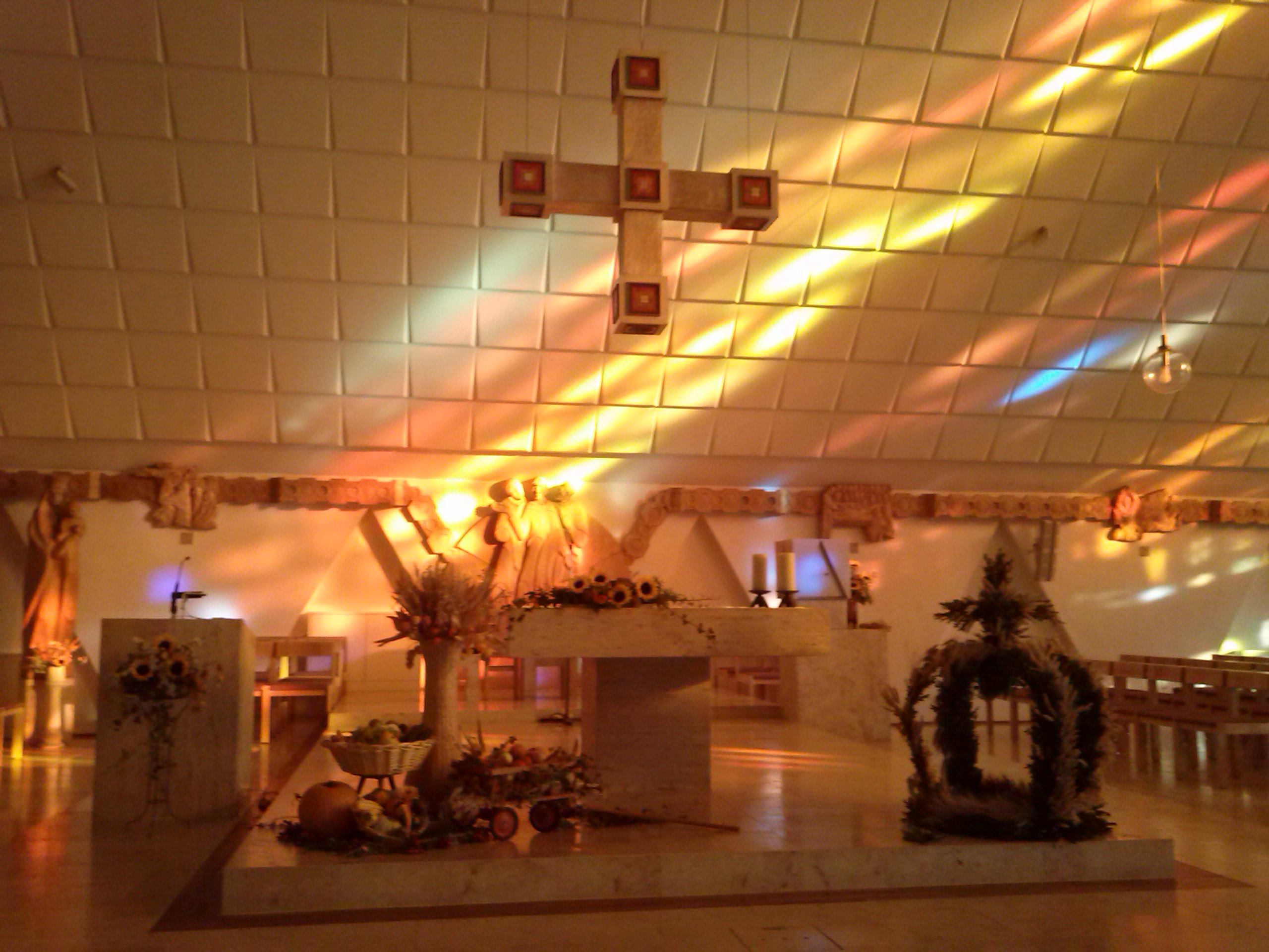 Röm.-kath. Kirche Bad Tatzmannsdorf